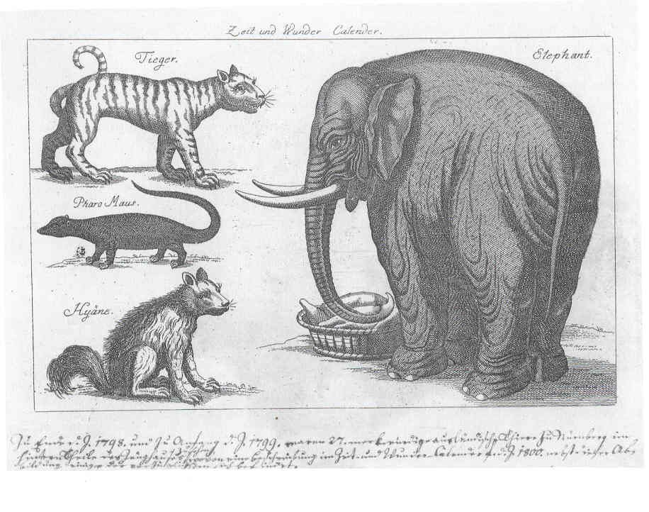 Menagerie des Antonio Alpi Schmuckblatt; Zeit- und Wunder-Calender des Jahres 1800 Stadtmuseum Nürnberg